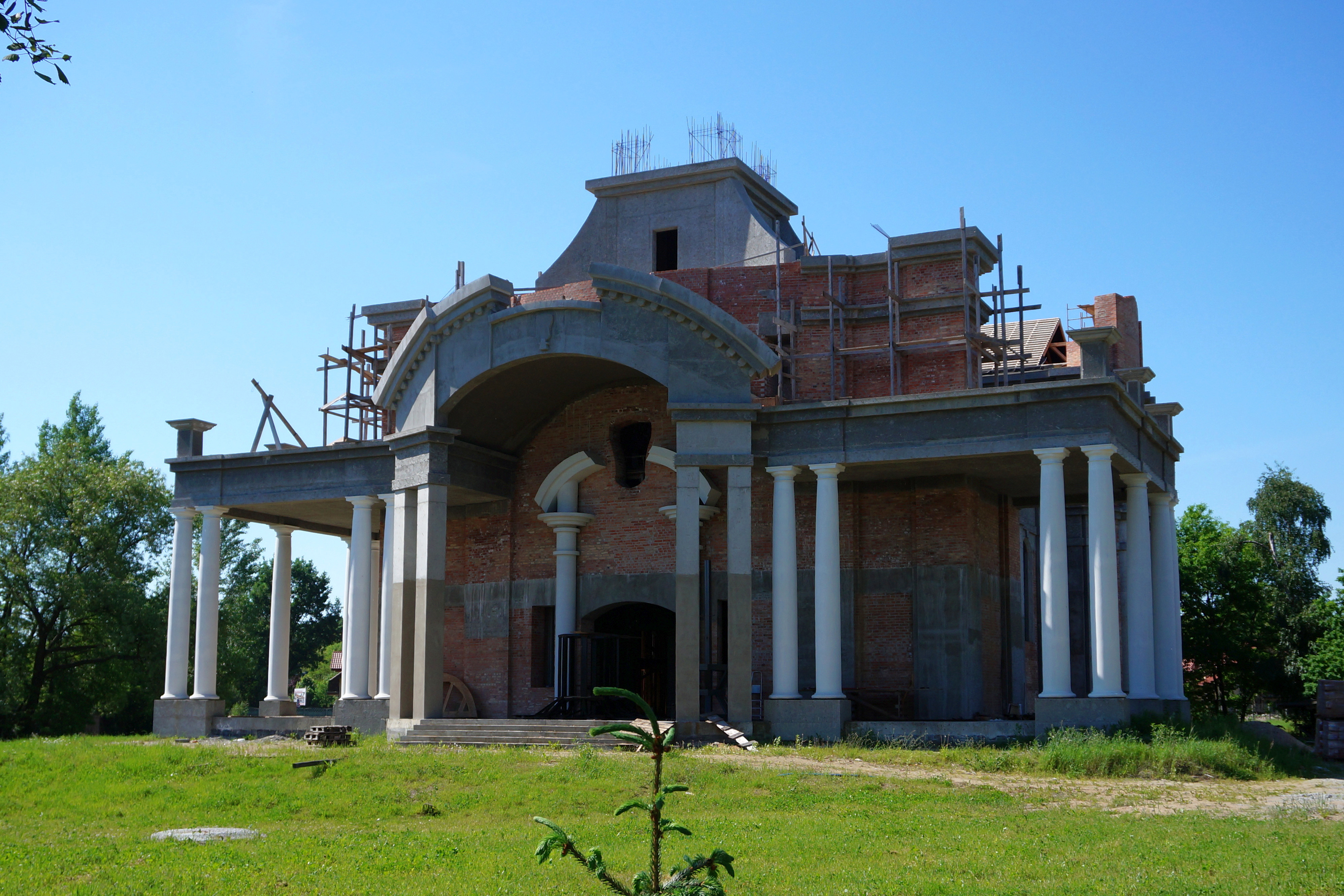 Stara Miłosna - Kościół św. Antoniego (w budowie).